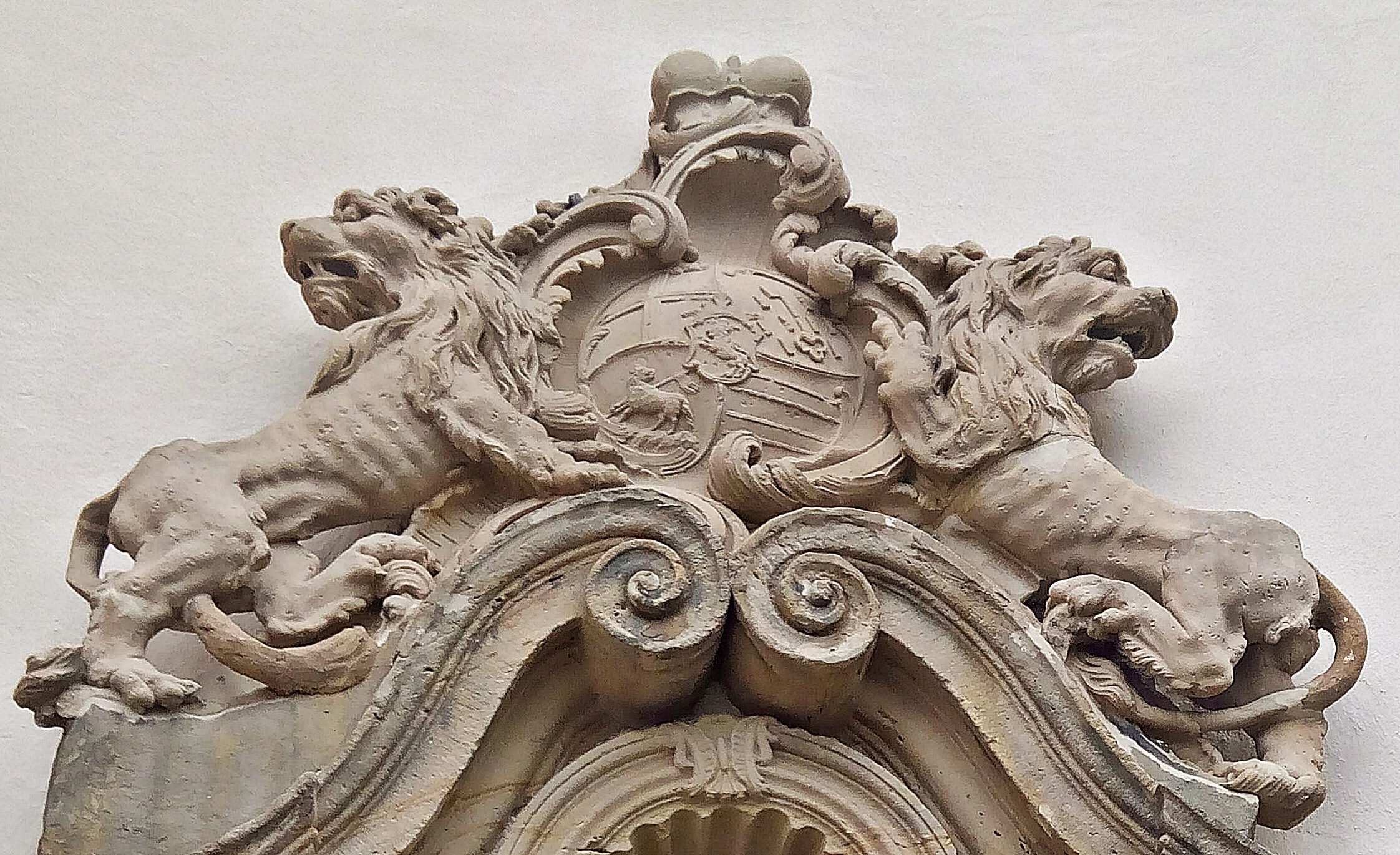 Frankenthal-Eppstein, Cyriakuskirche, Bischofswappen Johann IX. Philipp von Walderdorff